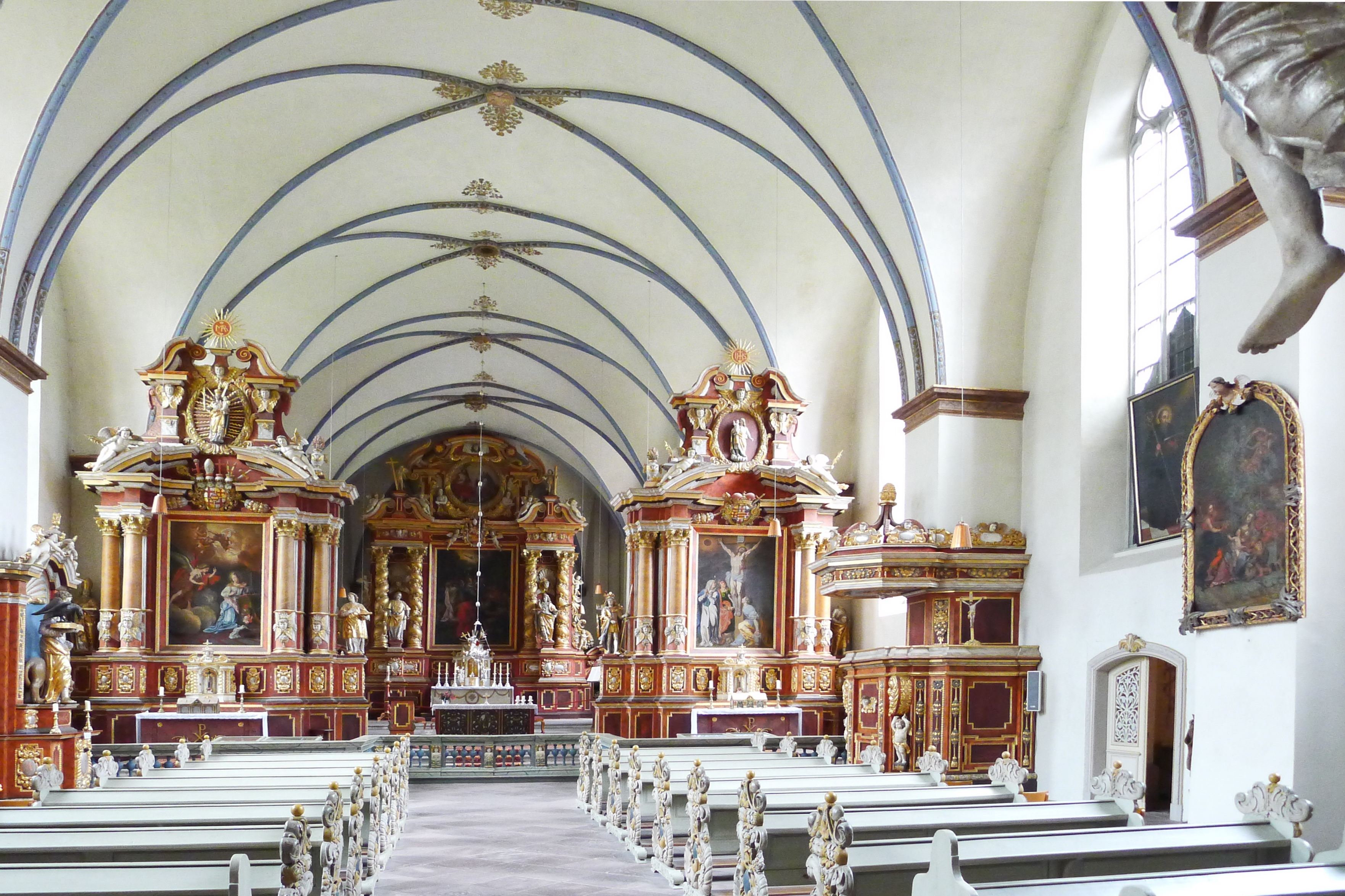 Langhaus mit Blick zum Chor